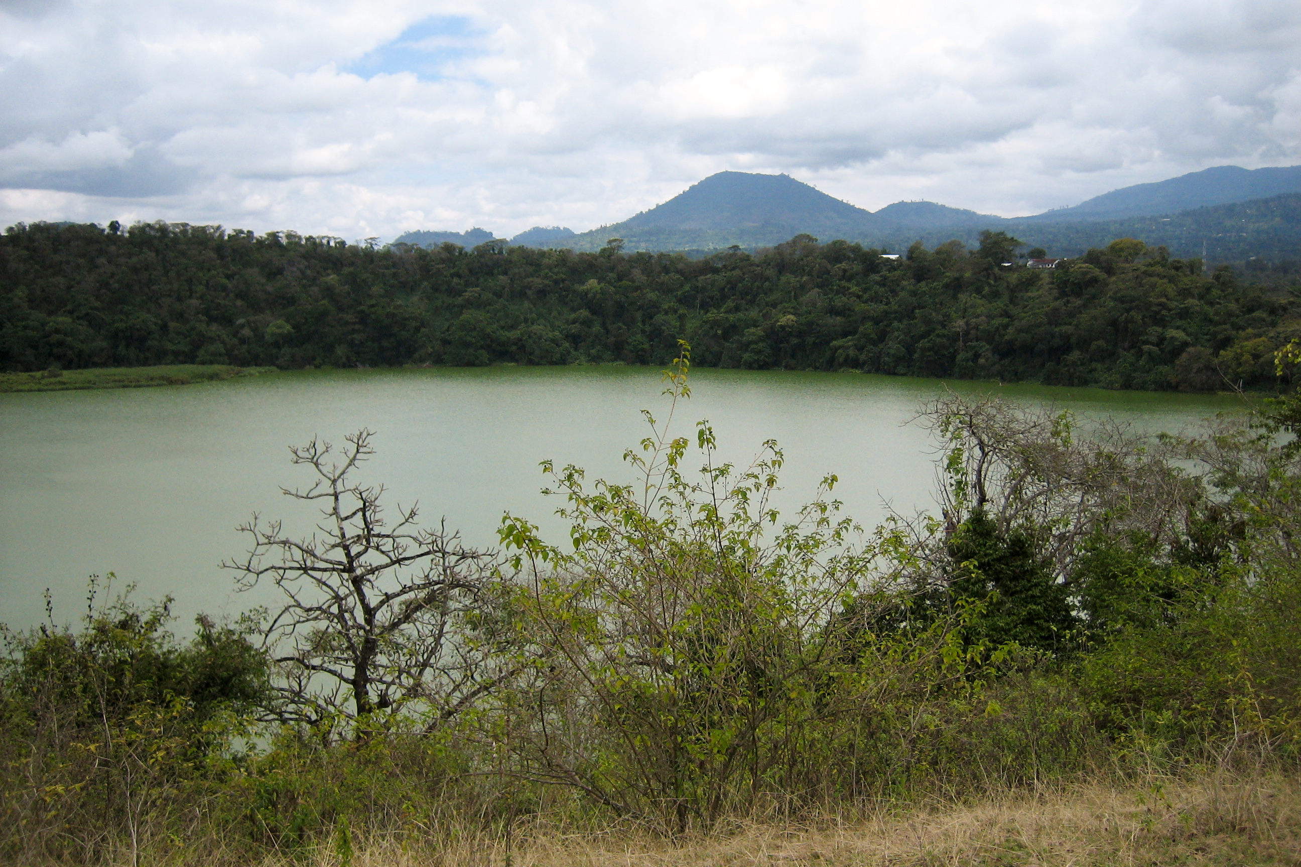 Lake Duluti near Tengeru, Arusha District, Tanzania